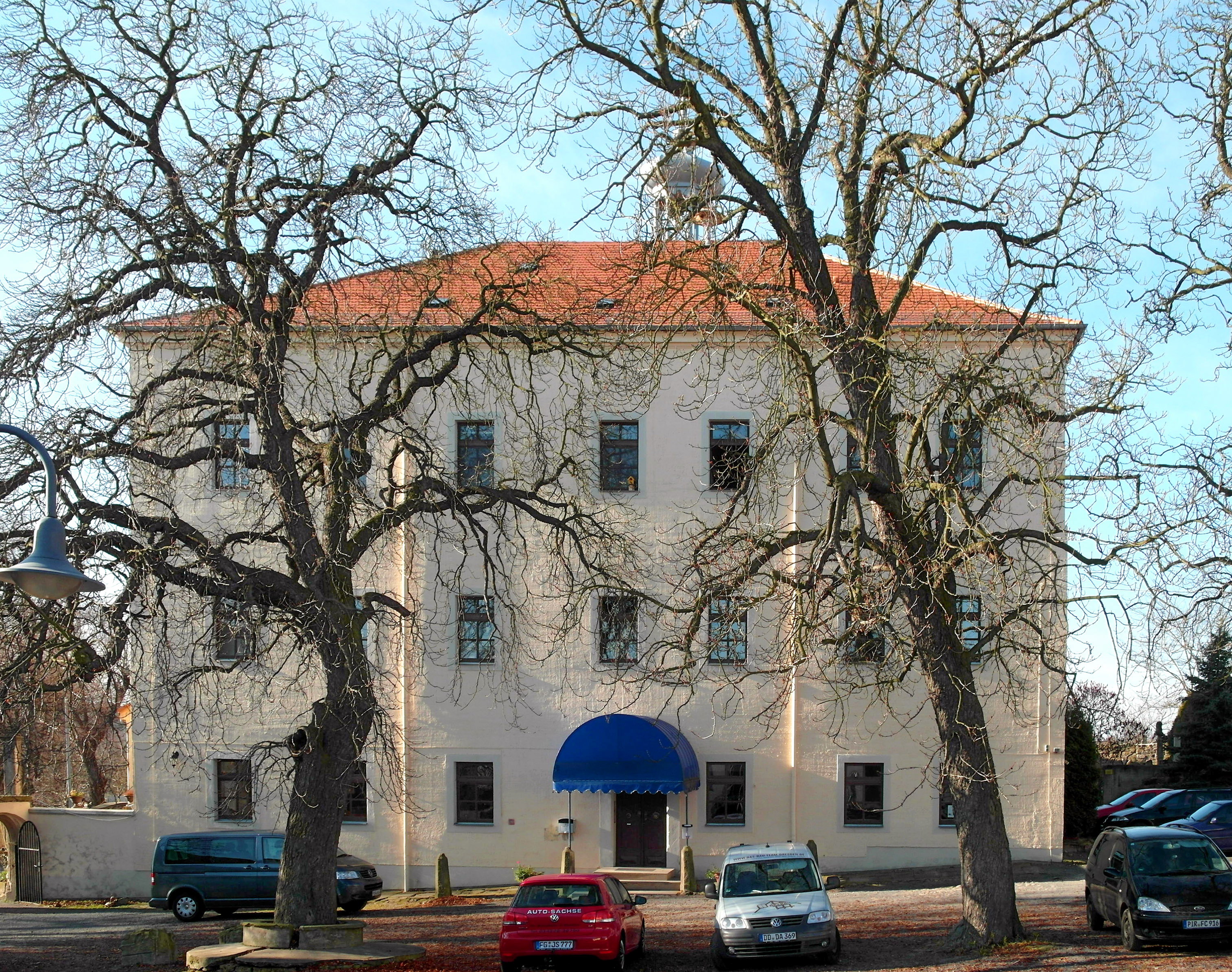 23.11.2012 01809 Röhrsdorf (Dohna) Hauptstraße 3 (GMP: 50.965573,13.807929): Der Herrensitz wird 1436 erstmals erwähnt. Röhrsdorf gehörte im 16. und 17. Jahrhundert den Herren von Bernstein. Das heutige Schloß entstand nach dem Brand von 1890. Sicht aus dem Hof von Osten. [SAM5111.JPG]20121123255DR.JPG(c)Blobelt